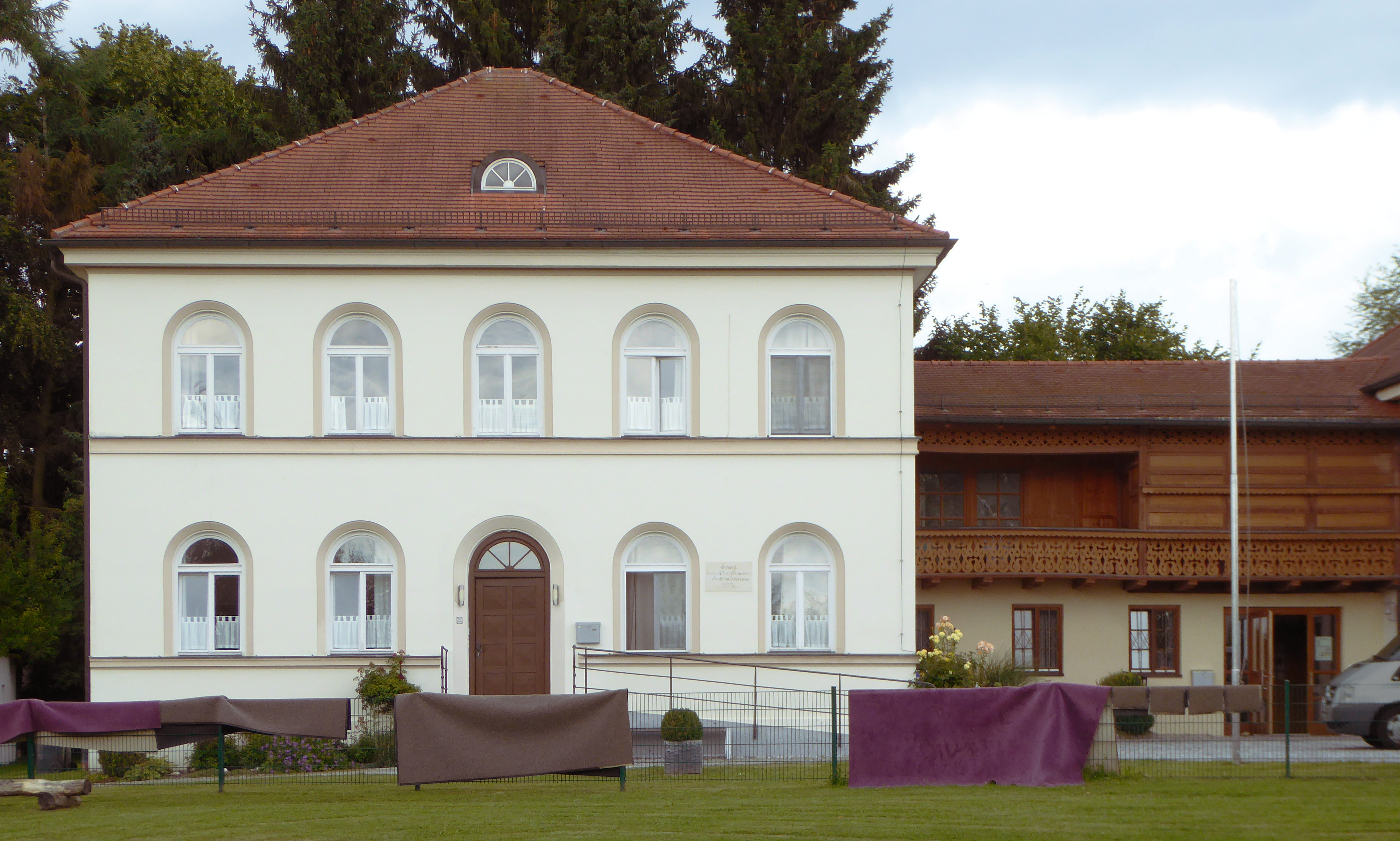 Kastl (Oberbayern), Südfront des Pfarrhauses.